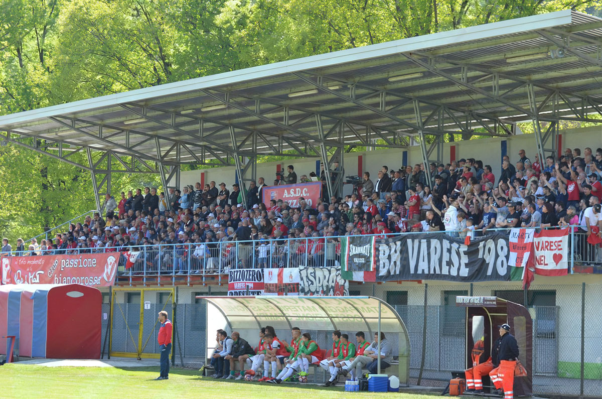 Tribuna maggiore dello stadio Alfredo d'Albertas di Gozzano (NO) durante il match Gozzano-Varese del 23-04-2017, valido per il campionato di Serie D-Girone A